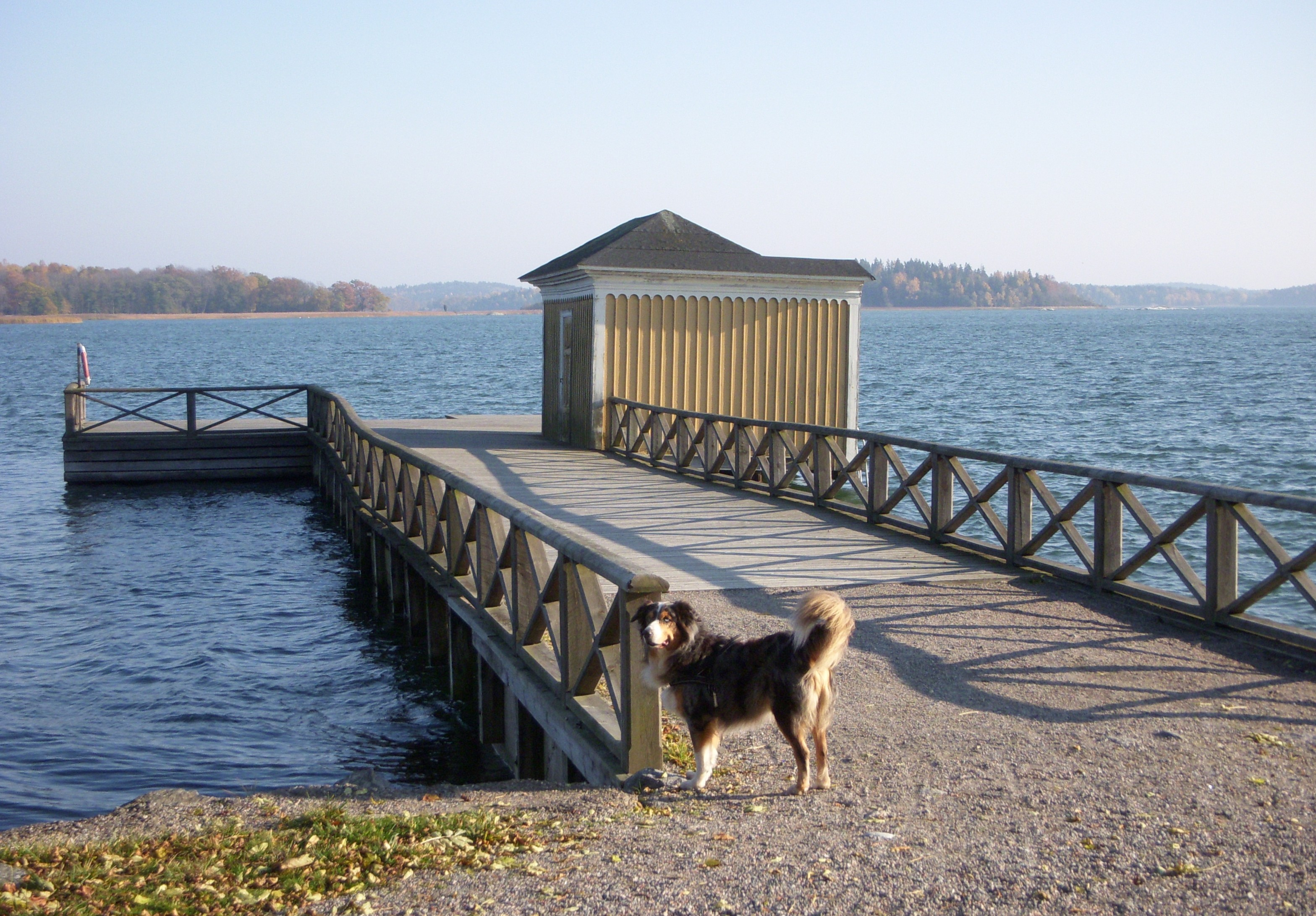 Tullgarns slott, bryggan